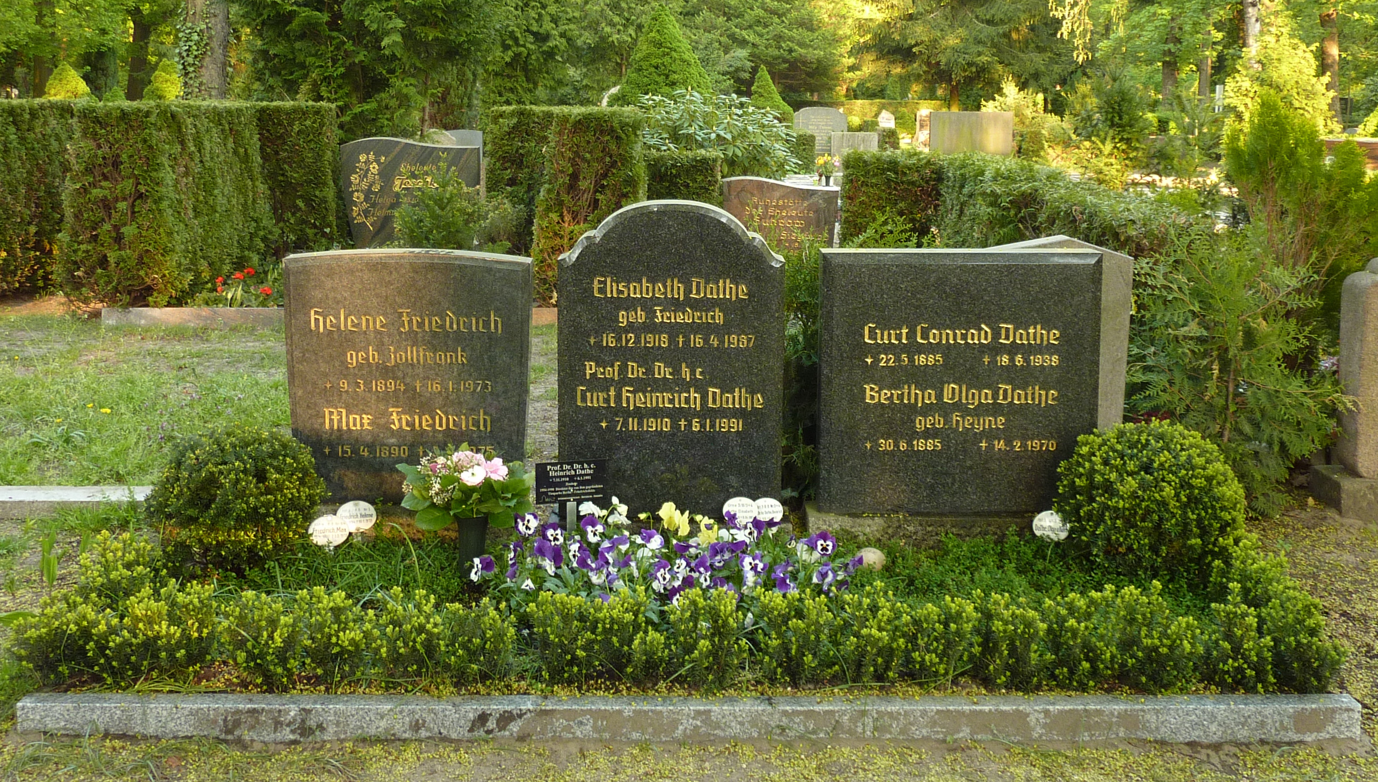 Familiengrabstätte von Prof. Dr. Dr. h. c. Heinrich Dathe, dem Gründer und langjährigen Direktor des Berliner Tierparks, auf dem Neuen Friedrichsfelder Friedhof in Berlin-Karlshorst.